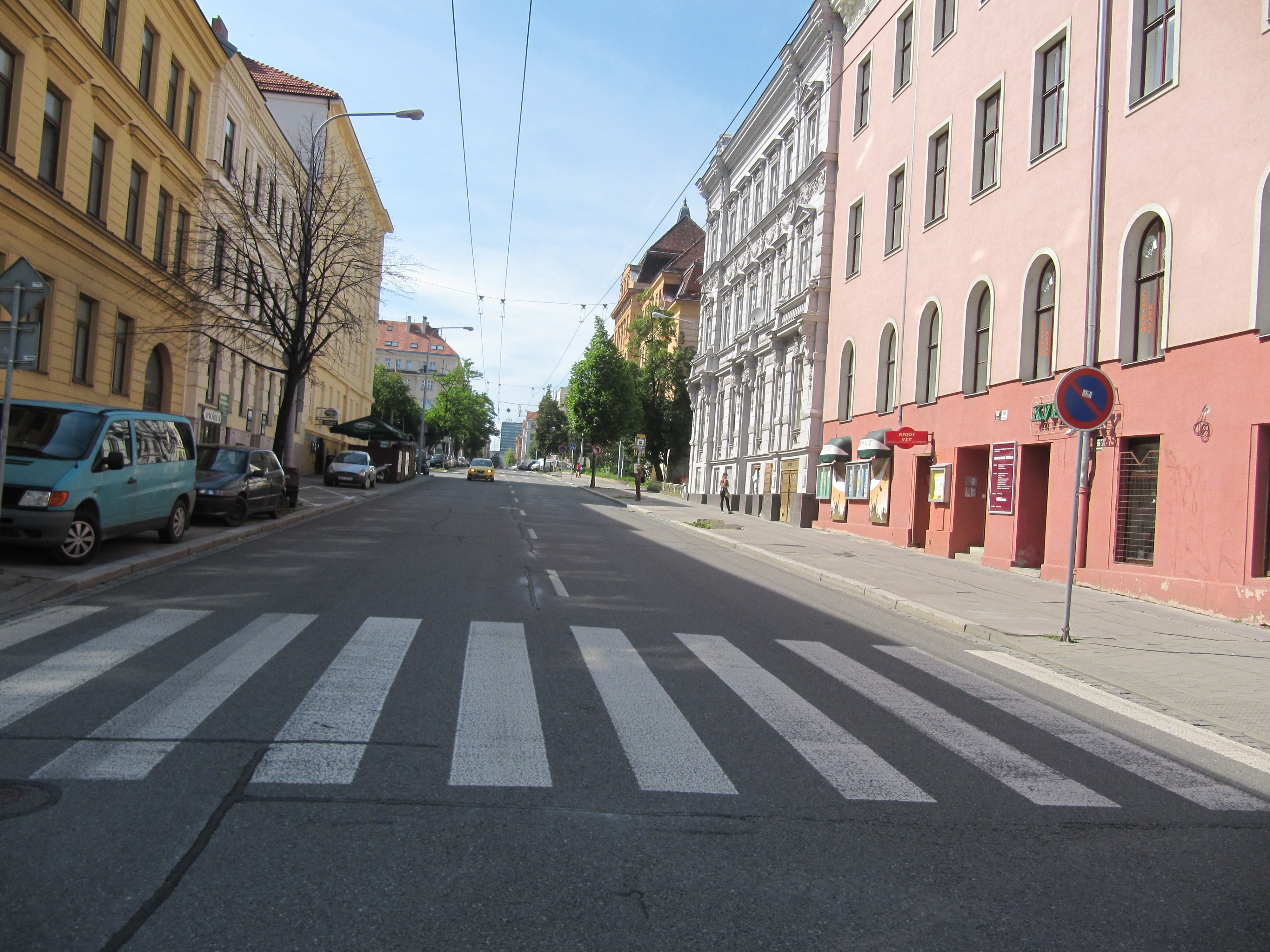 Brno, Kounicova ulice.